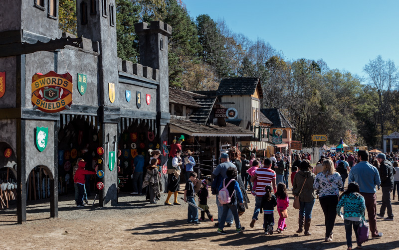 Carolina Renaissance Festival, Nov 2015